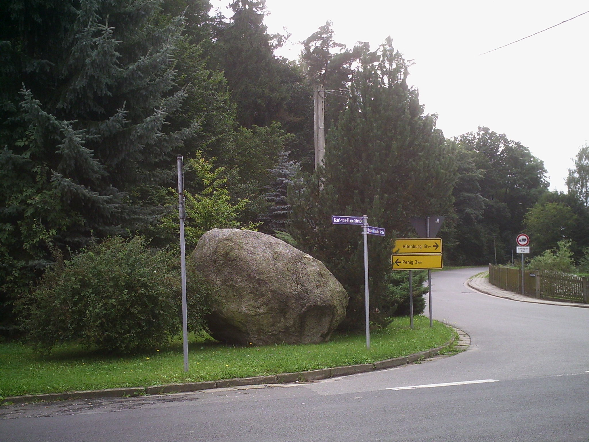 Findling im Dorfzentrum